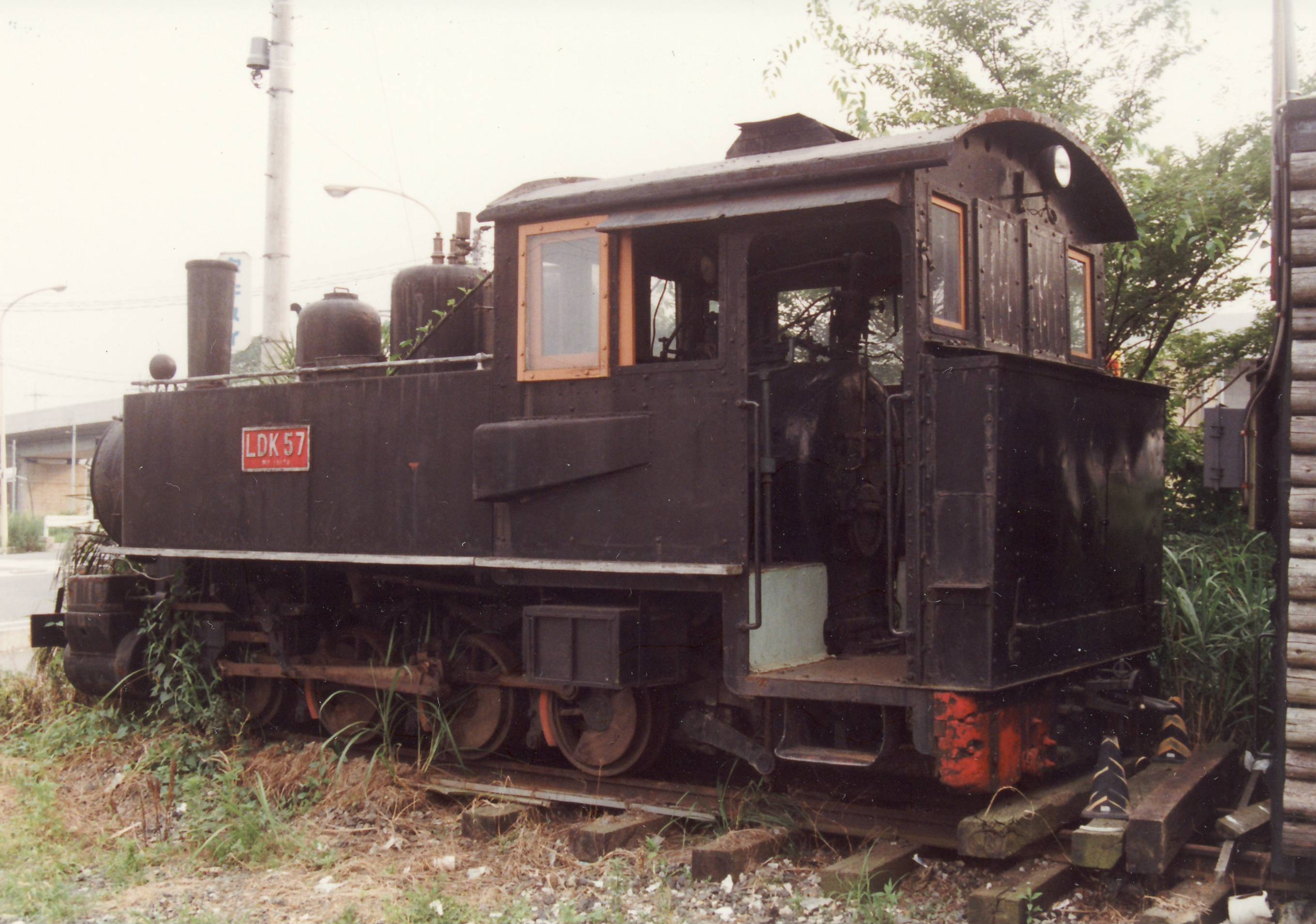 台湾鉄路管理局LDK50型蒸気機関車。狭軌 (762mm軌間) 時代の旧台東線のタンク式蒸気機関車。埼玉県蓮田市のステーキ店の店先に置かれていた当時の写真。1992年ごろ撮影。